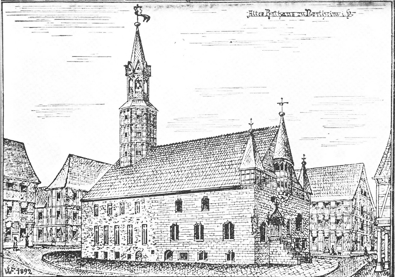 Zeichnung des alten Northeimer Rathauses, welches 1832 einem Brand zum Opfer fiel.